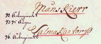 Måns Kierr förklaring av nummer